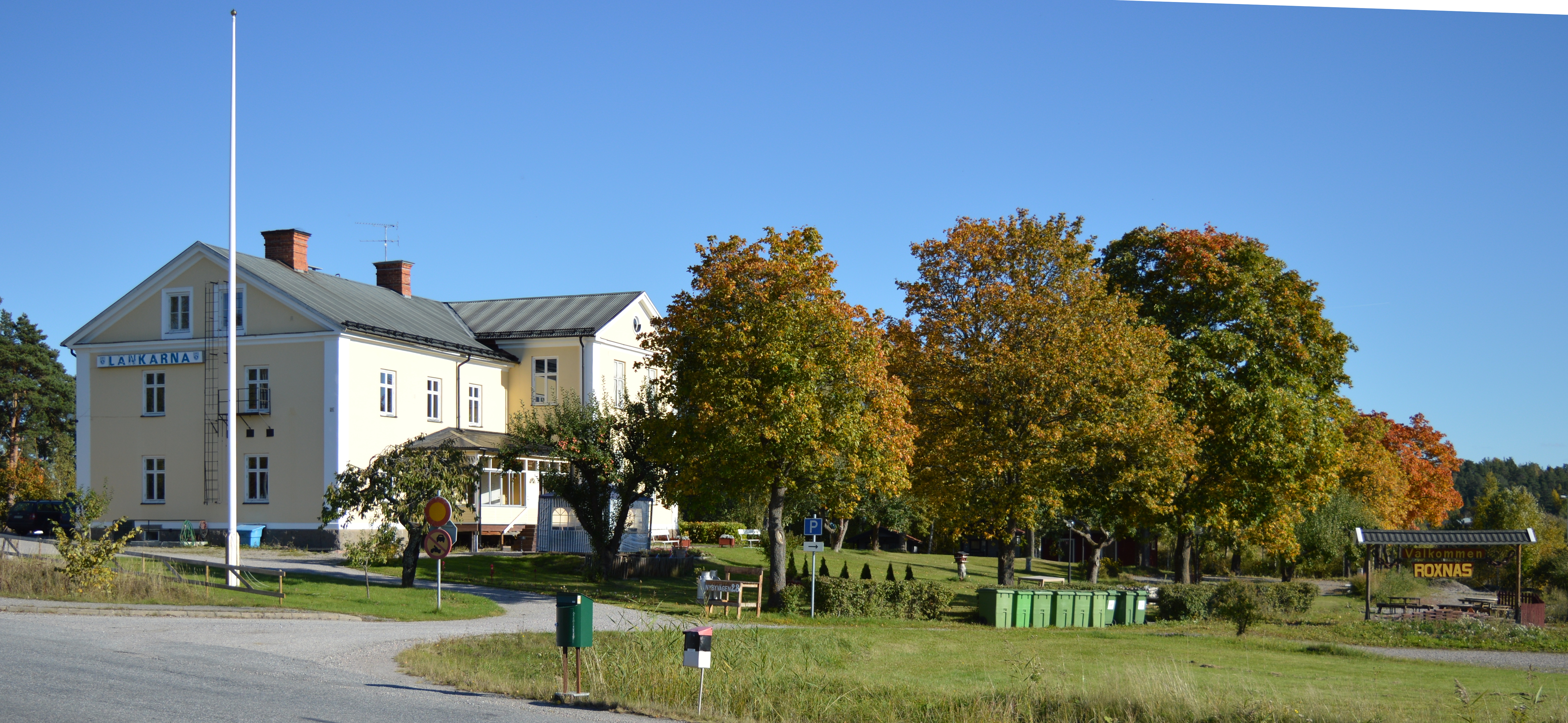 Roxnäs gamla skola, numera Länkarnas lokal, Eskilstuna kommun.